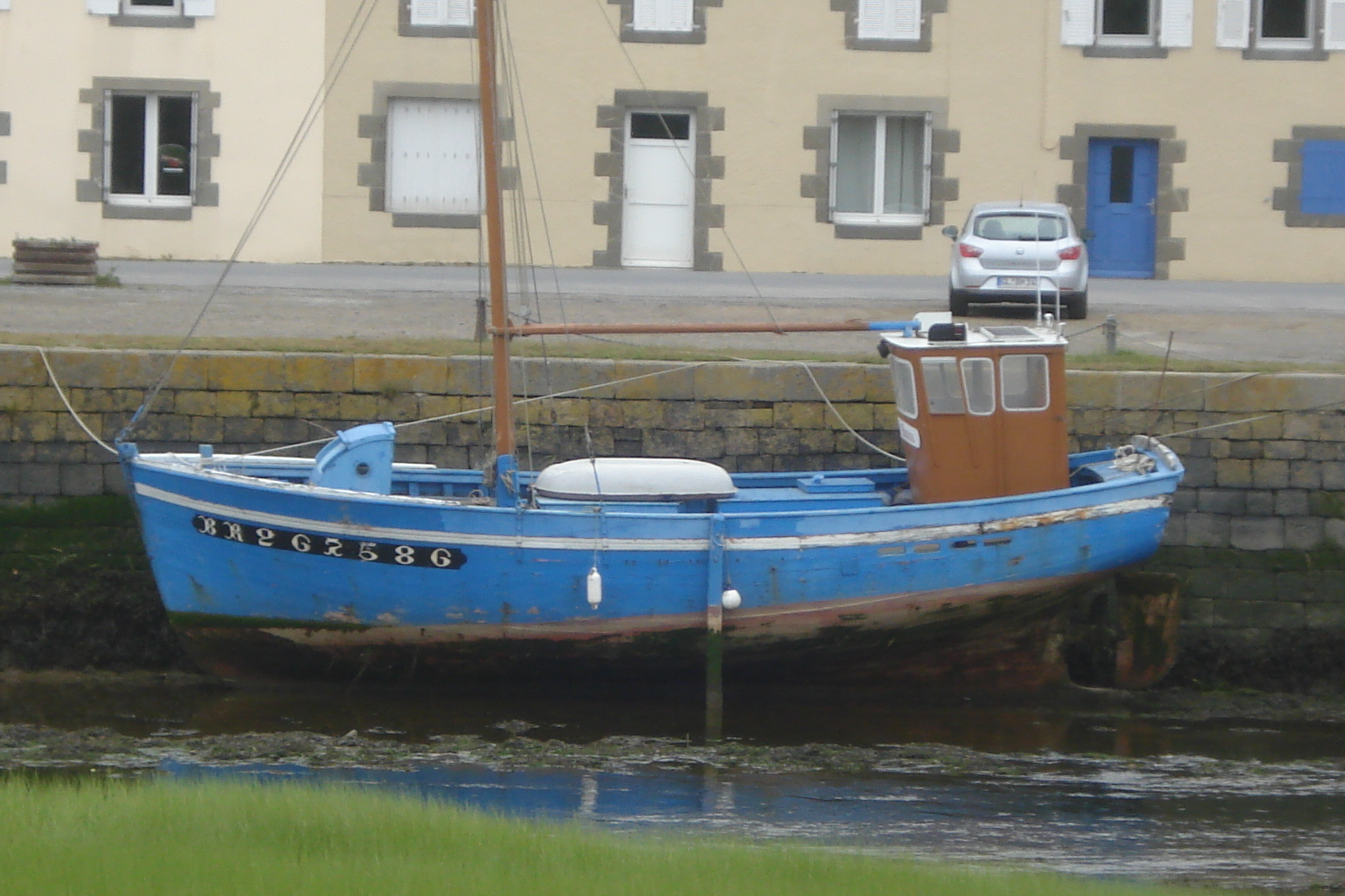 coquillier LOCH MONNA en 2011